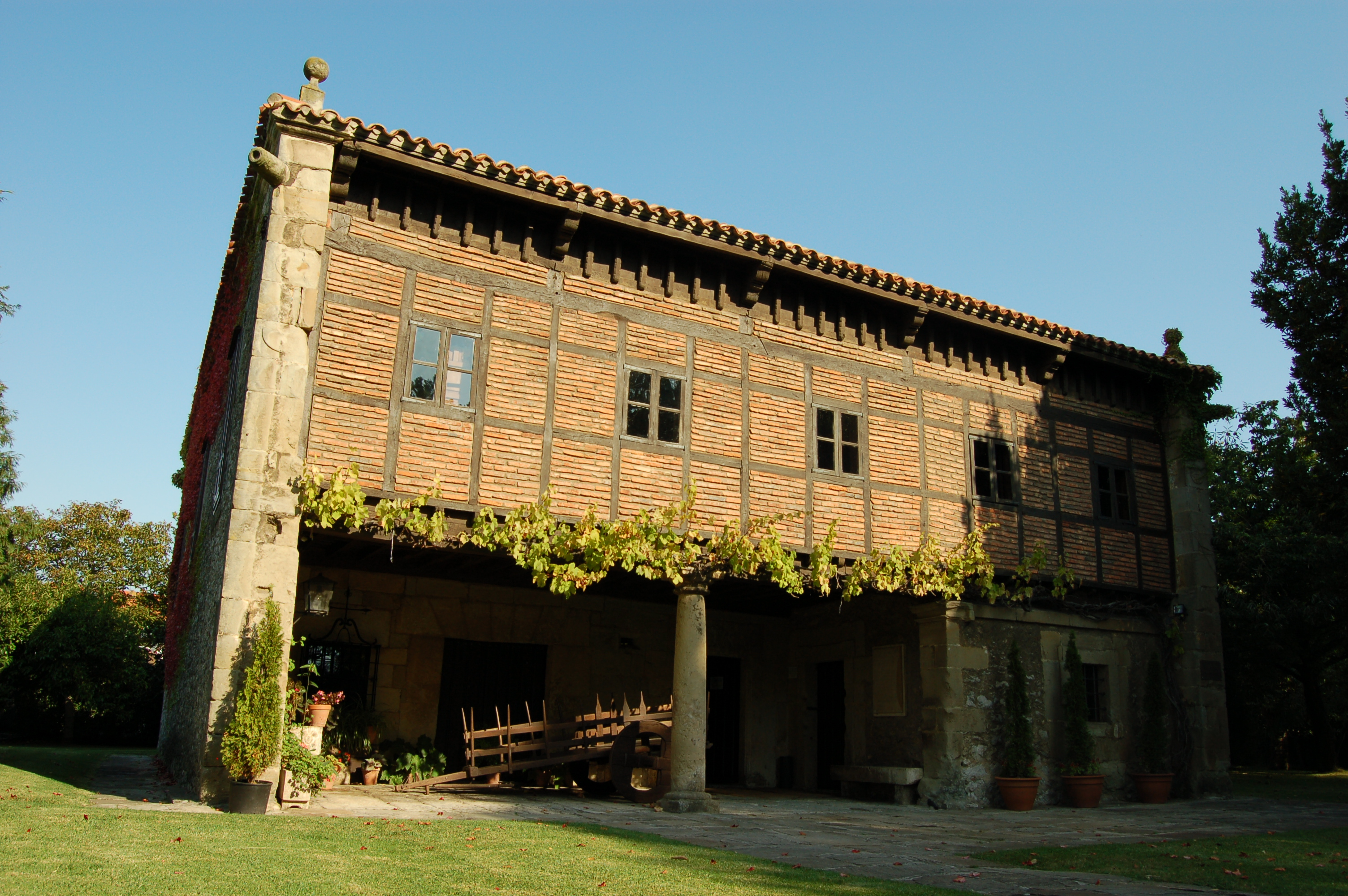 Museo Etnográfico de Cantabria, en Muriedas (España)